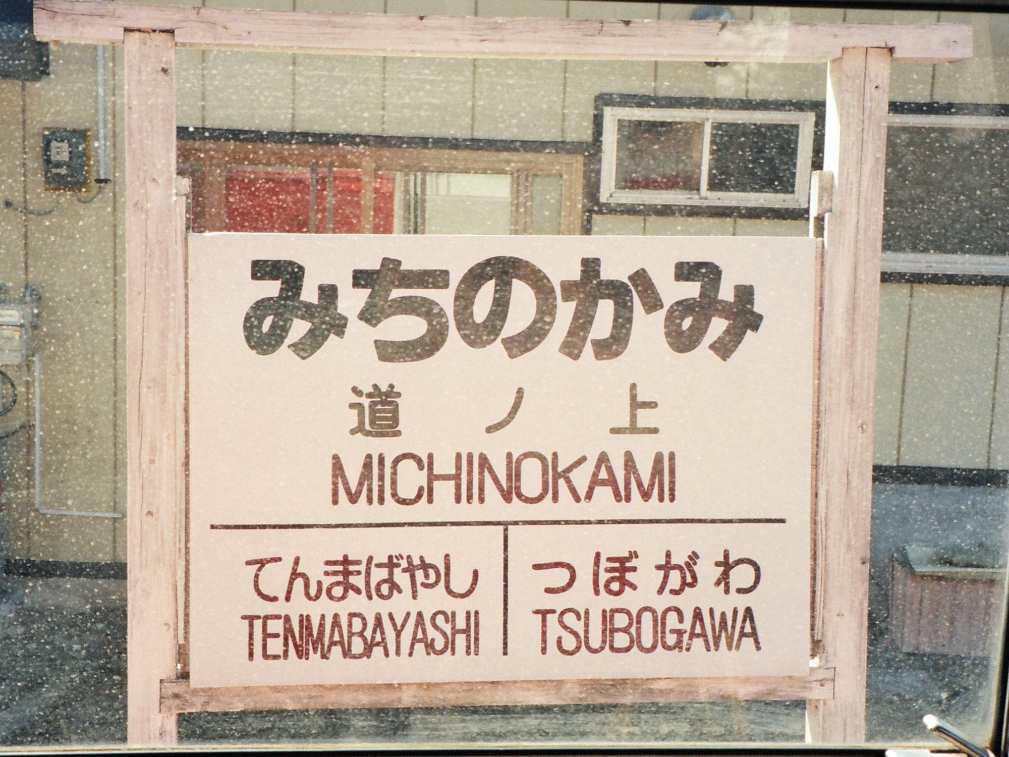 南部縦貫鉄道線 道ノ上駅（1997年3月26日撮影）